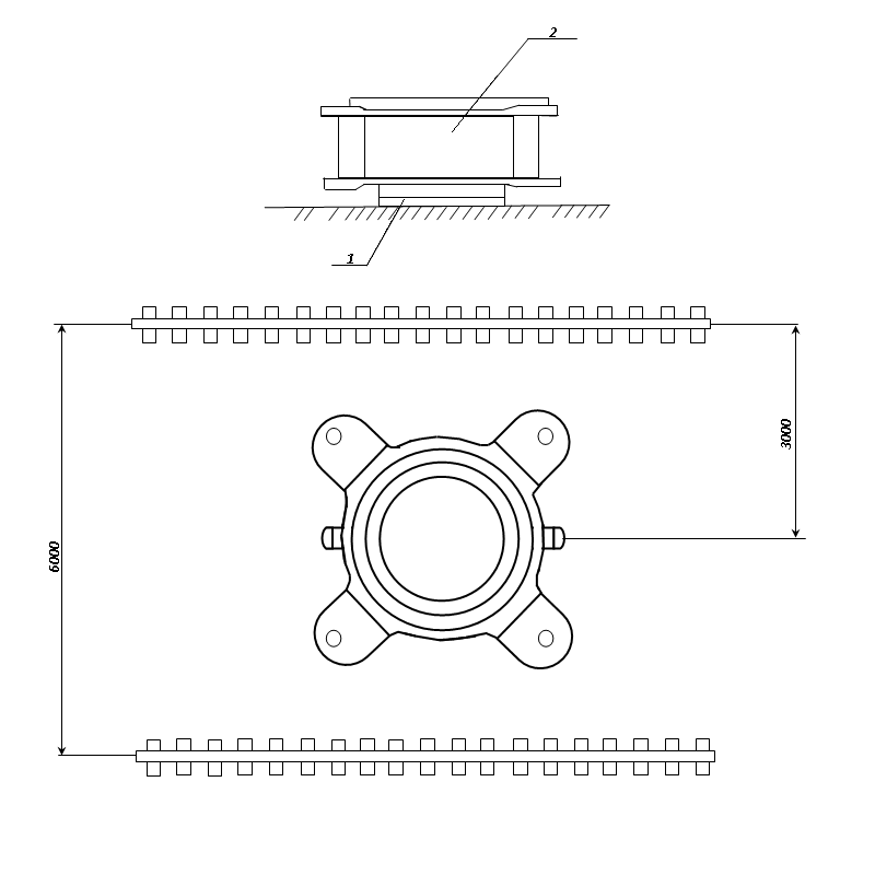 установка кольцевой рамы КБМ-401 - мой чертёж